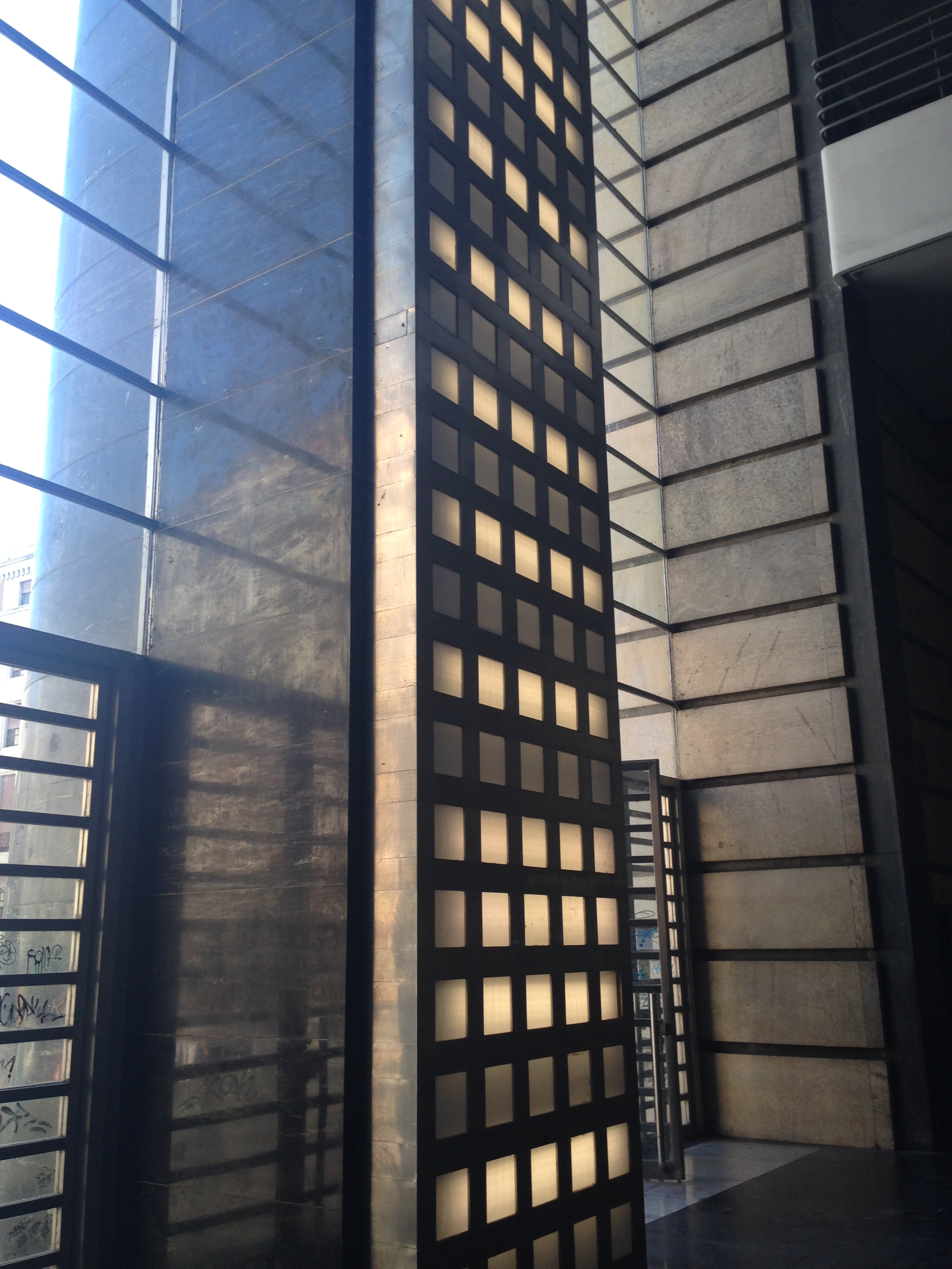 portone principale interno